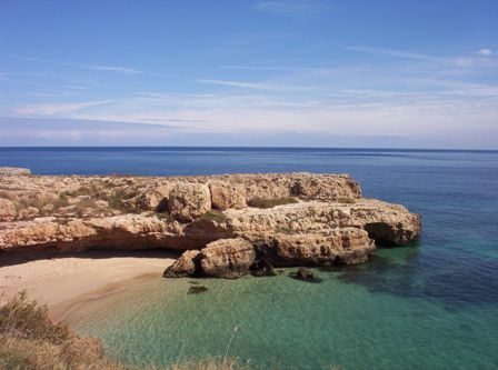 Una insenatura di Monopoli - La scaletta